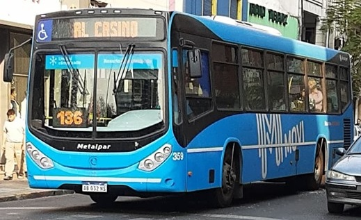 Interno 359 afectado a la línea 136, operada por la empresa Movi. El casino City Center es uno de los destinos de la línea.